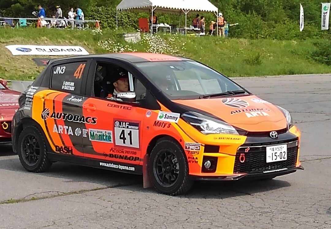 全日本ラリー選手権にて、石川昌平/竹藪英樹組のヴィッツ